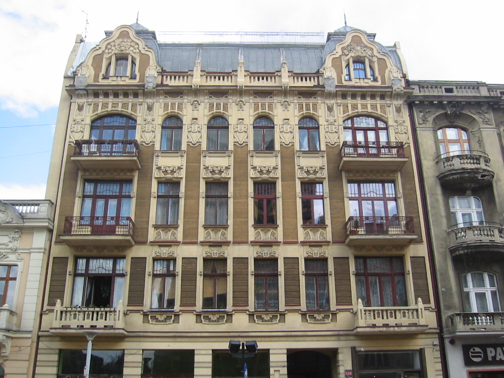 Kamienica Gustawa i Alwiny Schychtów, ulica Piotrkowska w Łodzi